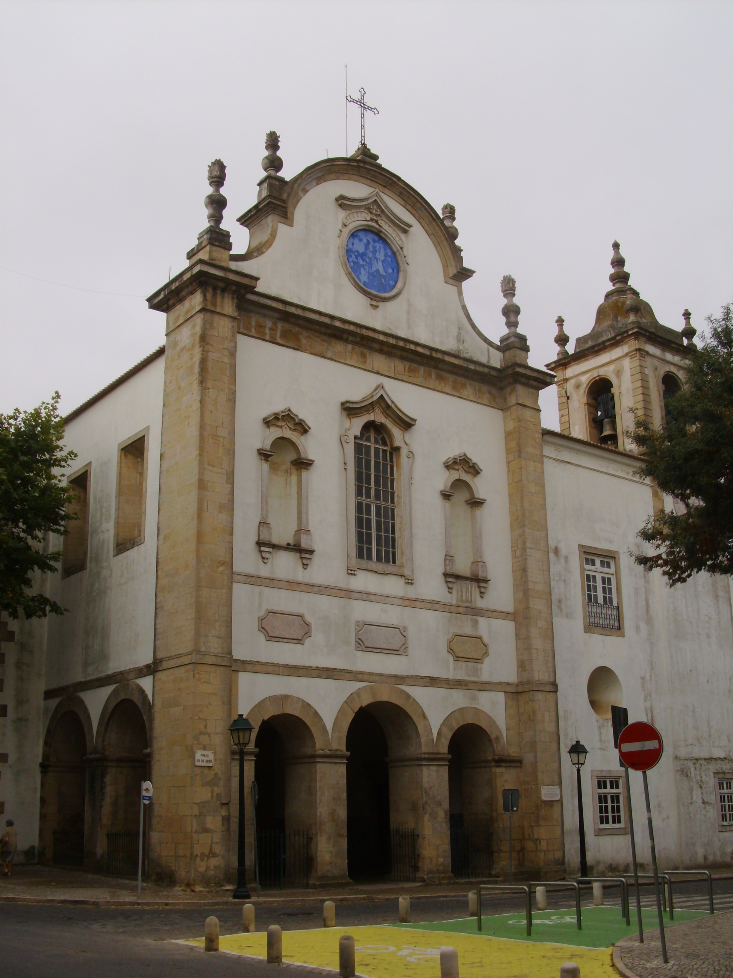 Igreja e Convento da Graça, freguesia de São Pedro e Santiago, cidade e concelho de Torres Vedras, distrito de Lisboa, Portugal.